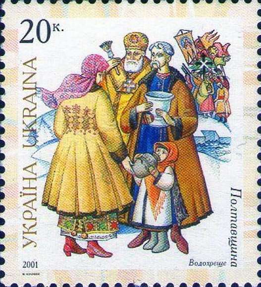 Марка Украины 2001 года. Водокрещи